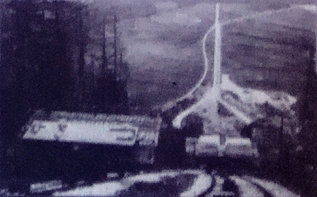 Ferrovia marmifera di Lasa - Cambio centrale con le piattaforme di carico